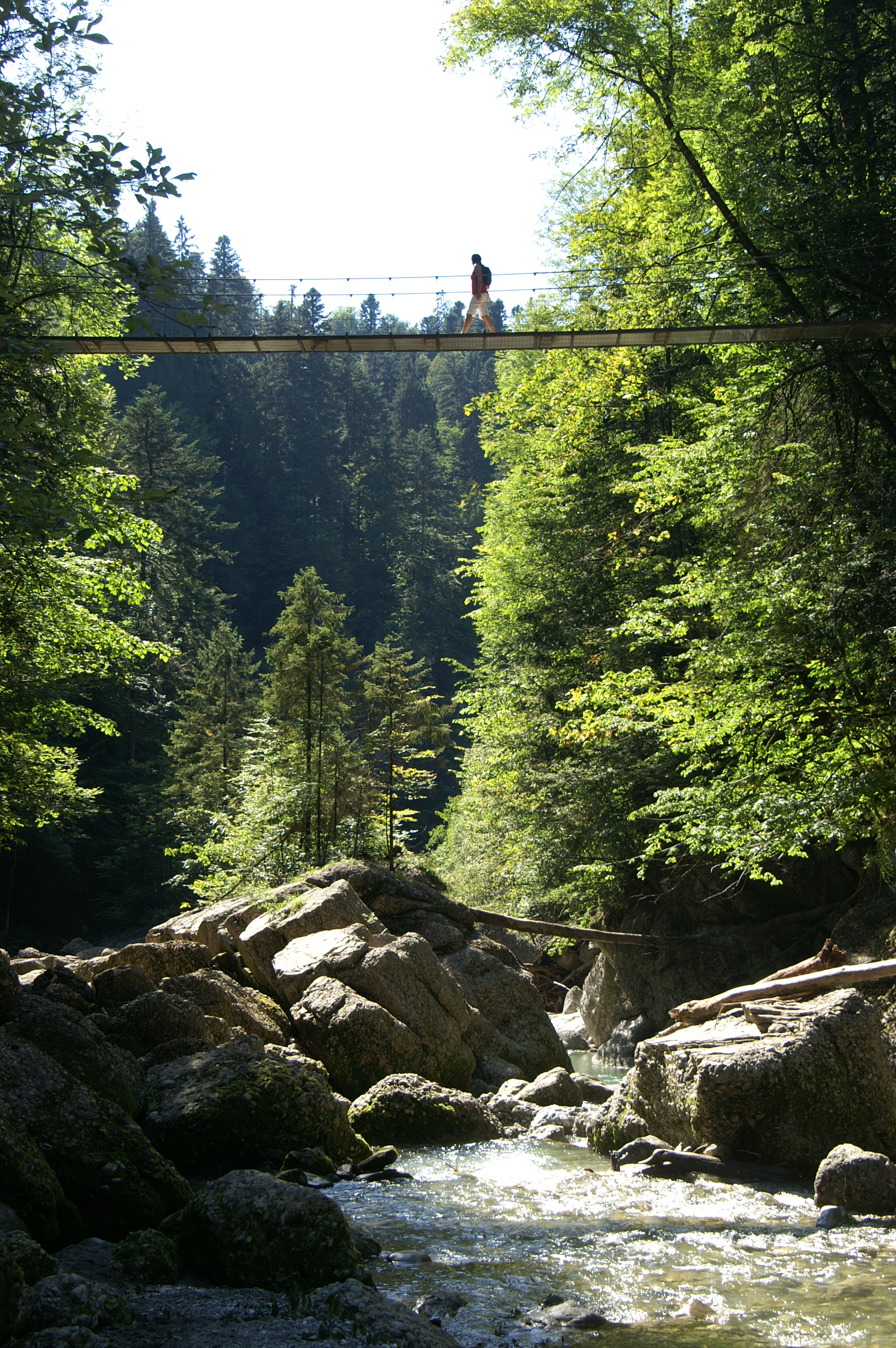 Drahtsteg Hängebrücke über die Subersach in Lingenau im Bregenzerwald , Vorarlberg. Veröffentlicht: Georg Kessler in "Freizeit im Ländle, Die schönsten Ausflugziele in Vorarlberg ISBN 978-3-7022-3068-5 2010.